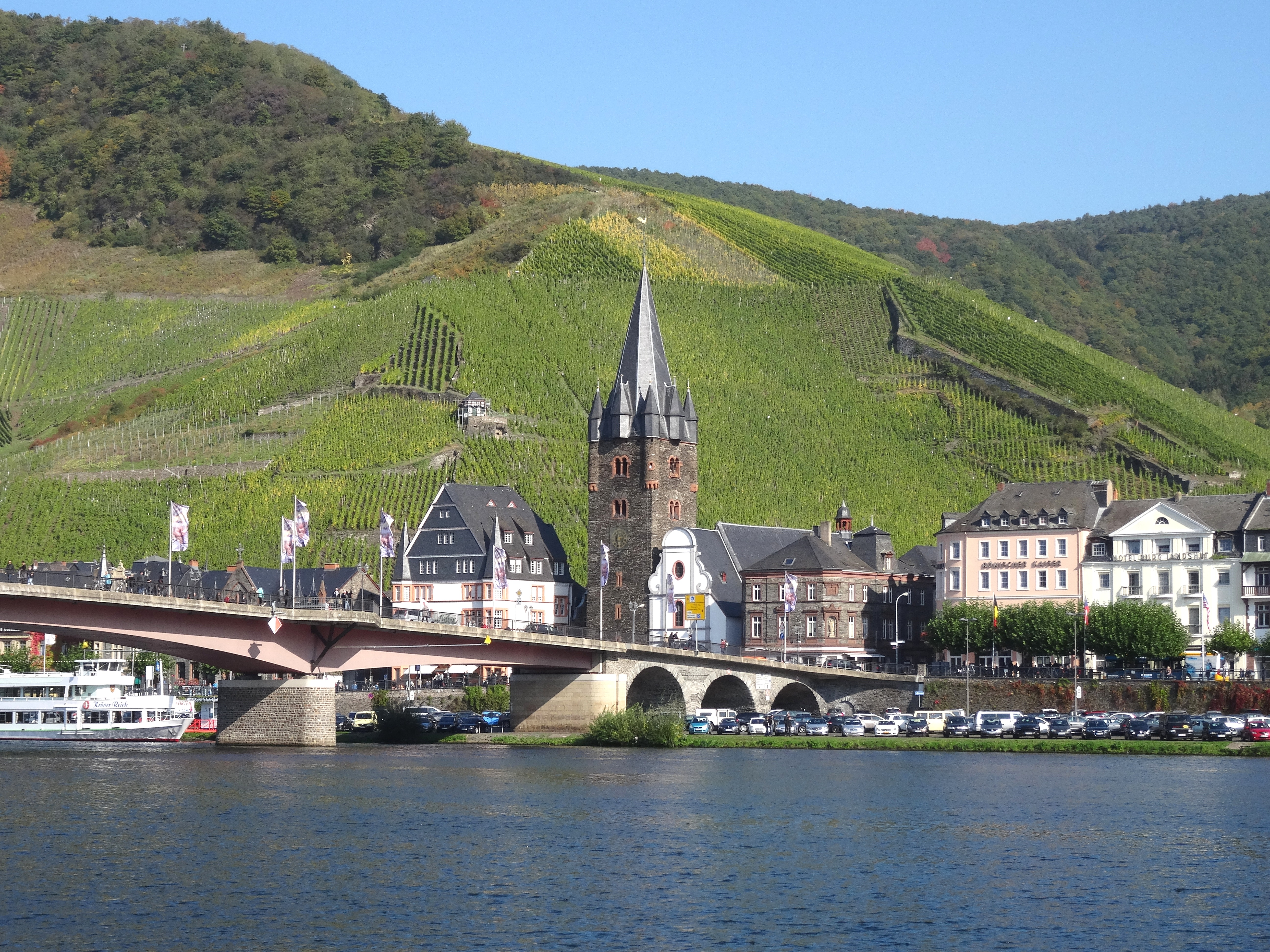 Weinberg "Bernkasteler Doctor" mit Altstadt